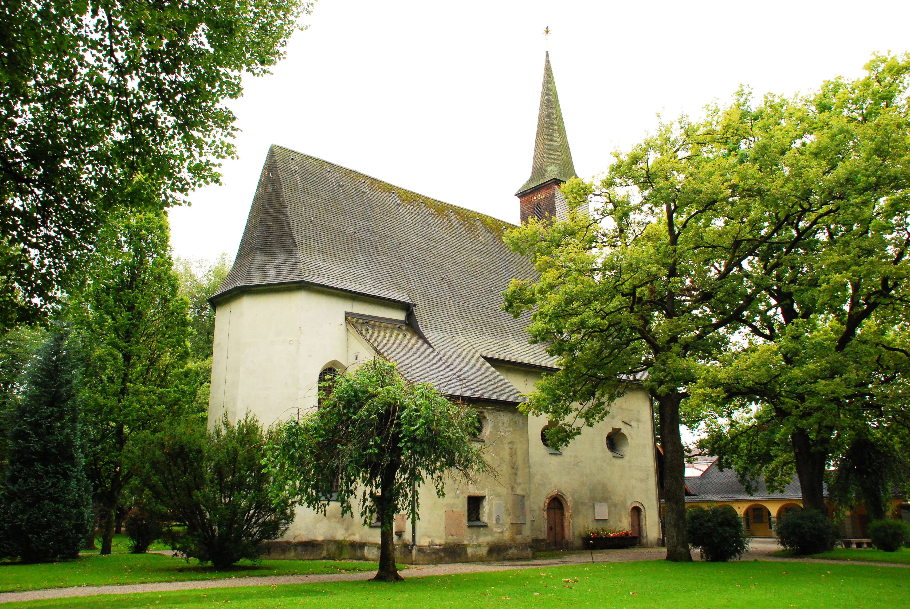 Ehemalige Friedhofskirche St. Georg und Katharina, seit 1922 Kriegergedächtnisstätte an der Ludwigstraße 19 in der Kreisstadt Traunstein, Regierungsbezirk Oberbayern, Bayern. In der Bayerischen Denkmalliste unter Aktennummer D-1-89-155-4 als Baudenkmal aufgeführt. Laut Denkmalliste errichtet im Jahr 1639.